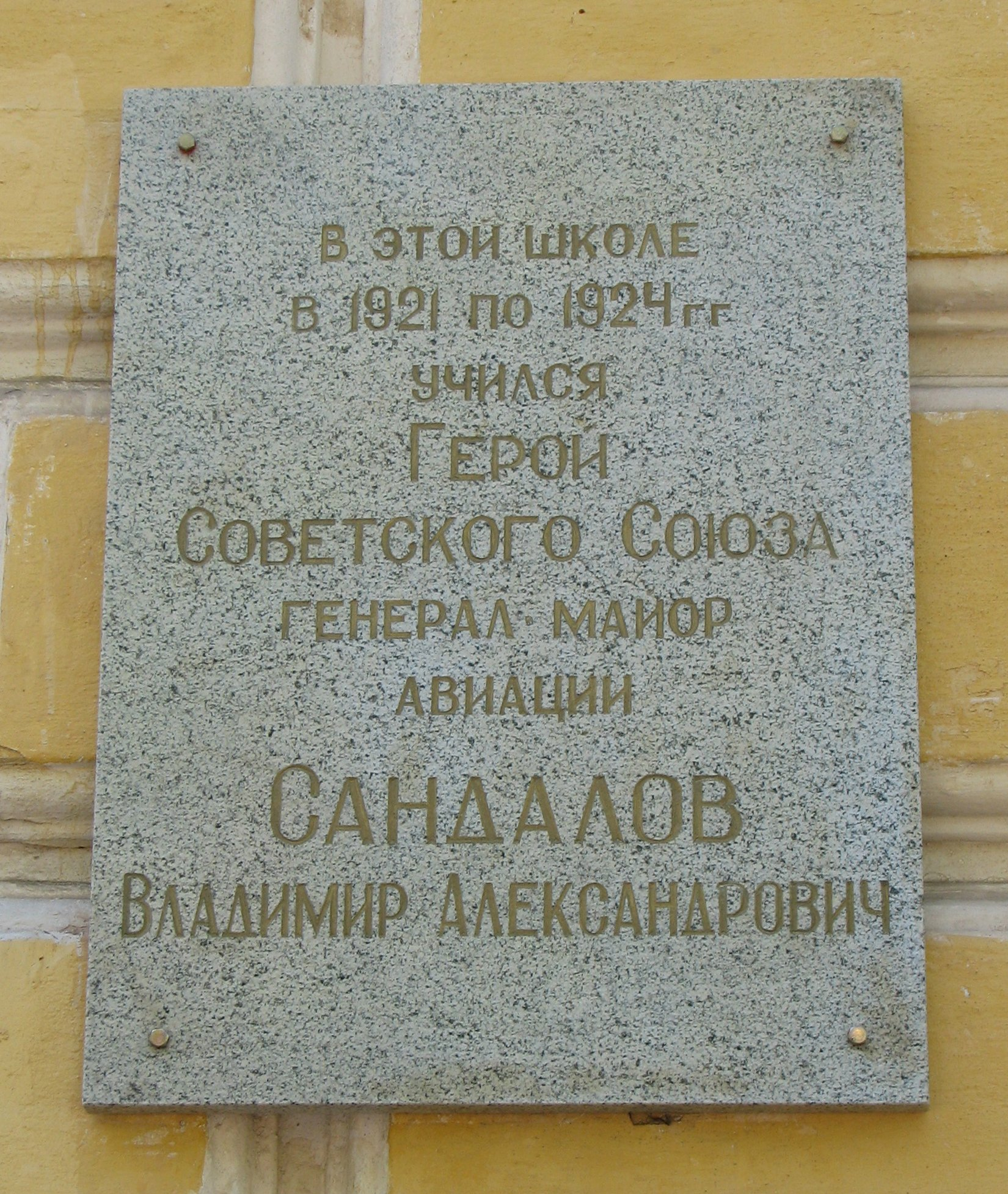 Мемориальная доска, посвящённая Владимиру Александровичу Сандалову. Школа № 4, Гатчина